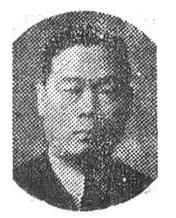 Kim Jun-yeon